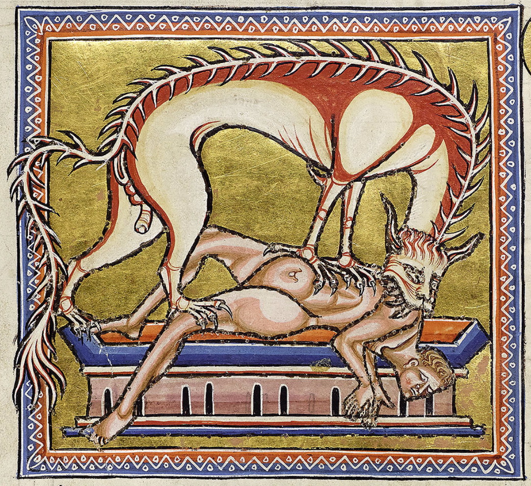 Hiena, detalhe do Bestiário de Aberdeen, fl 11v